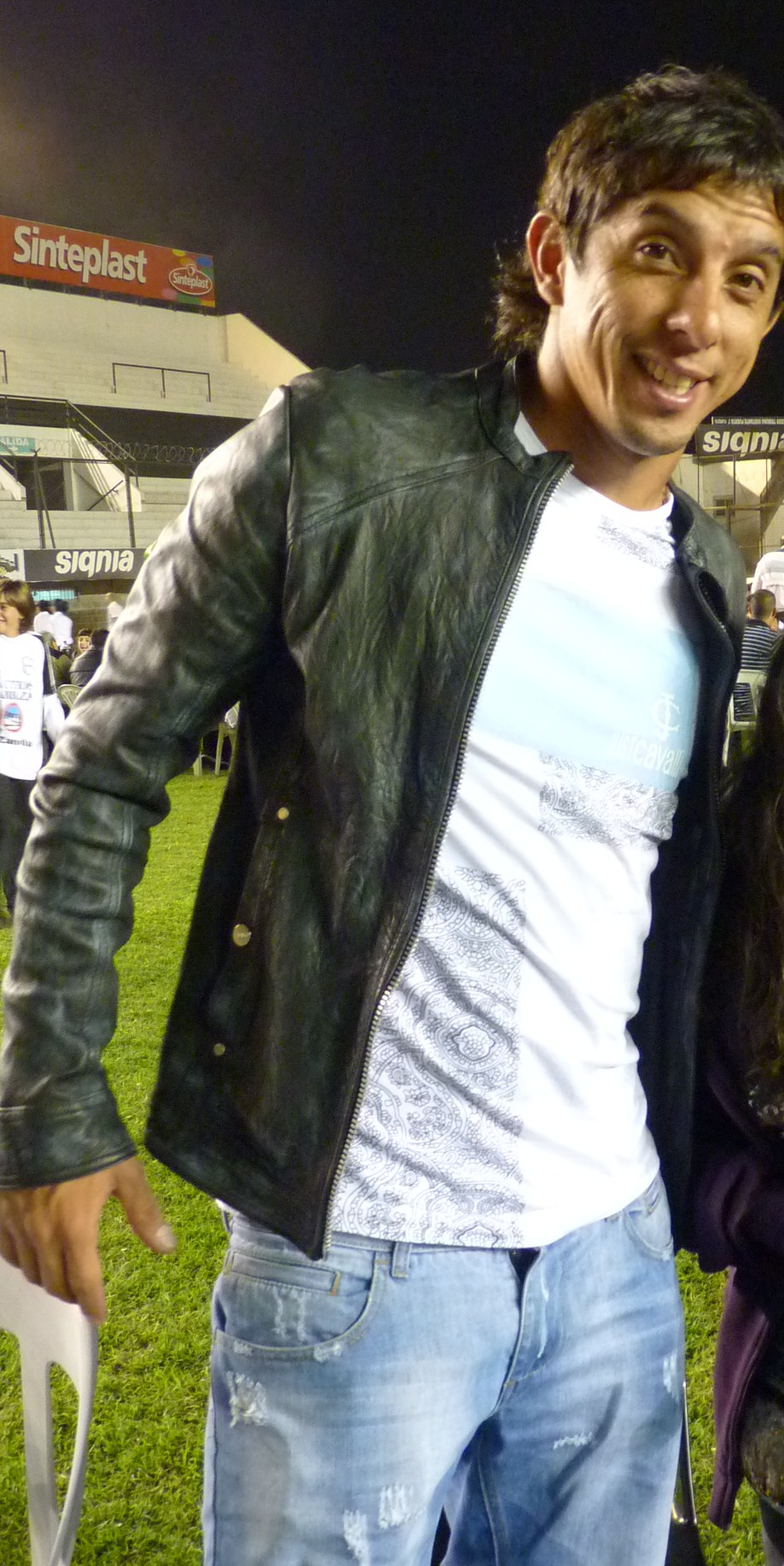 Foto de hugo barrientos en aniversario de all boys